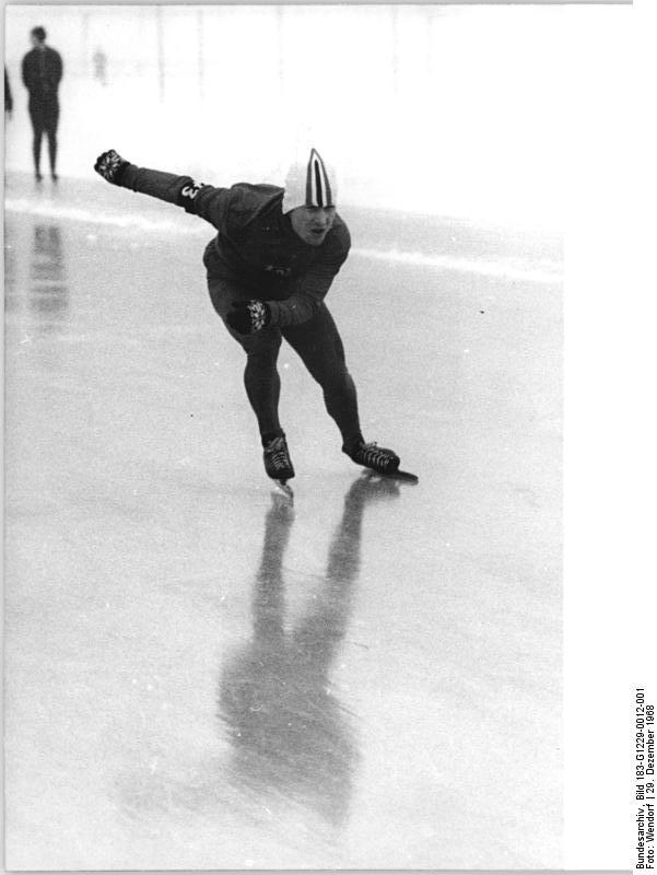 Gerd Bonke Zentralbild Wendorf wen-gü 29.12.1968 Berlin: 2.Pokalwettkämpfe der Jugend im Eisschnellauf um den Dynamocoup am 29.12.1968 im Sportforum Gerd Bonke (DDR) erkämpfte sich mit 182,537 Punkten (Deutscher Rekord der DDR) im Kleinen Mehrkampf den Dynamocoup. Abgebildete Personen: Bonke, Gerd: Eisschnelläufer, DDR